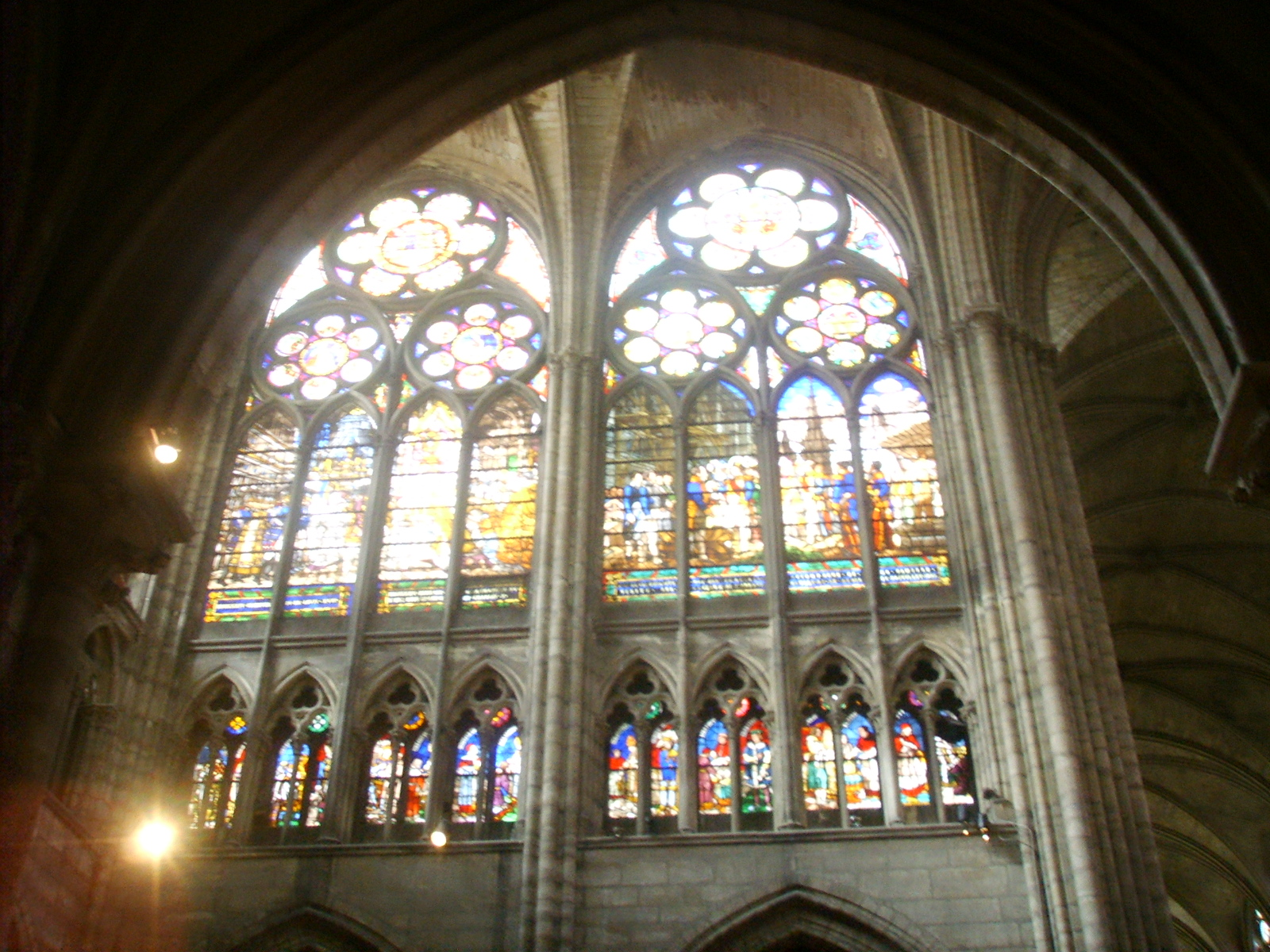 Basilica_di_saint_Denis vetrata Paris